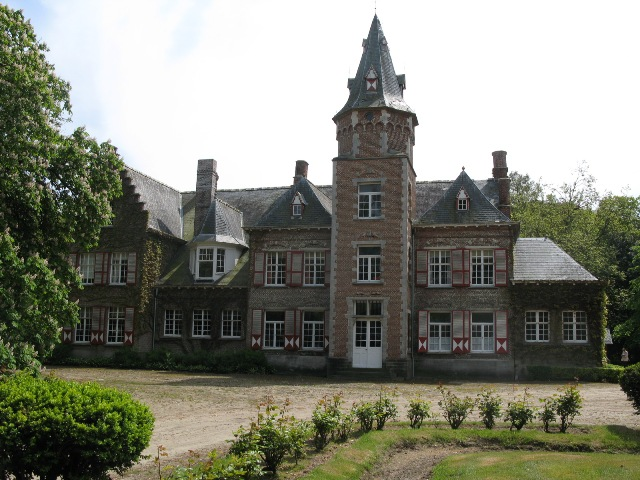 zedelgemsesteenweg_264-266 (21)